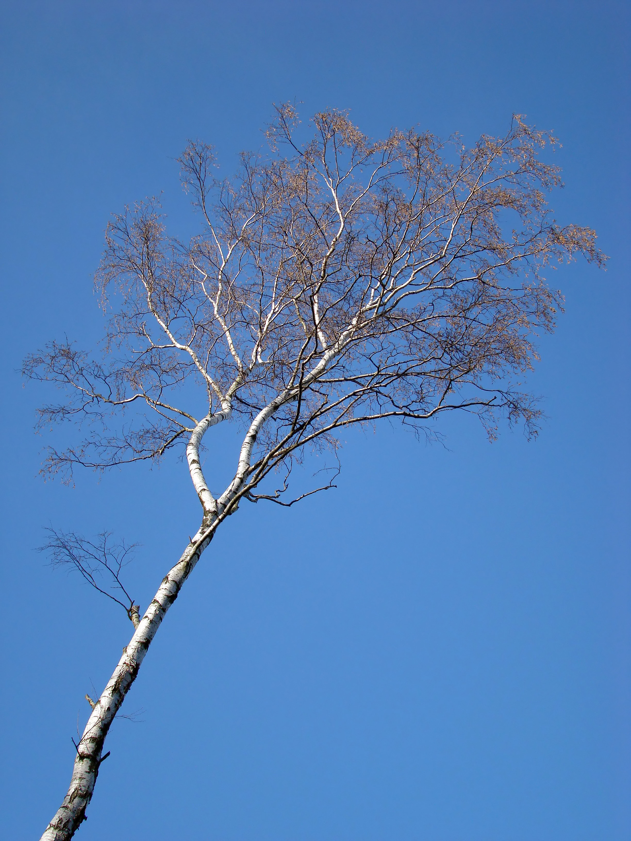 Betula pendula (Brzoza brodawkowata)